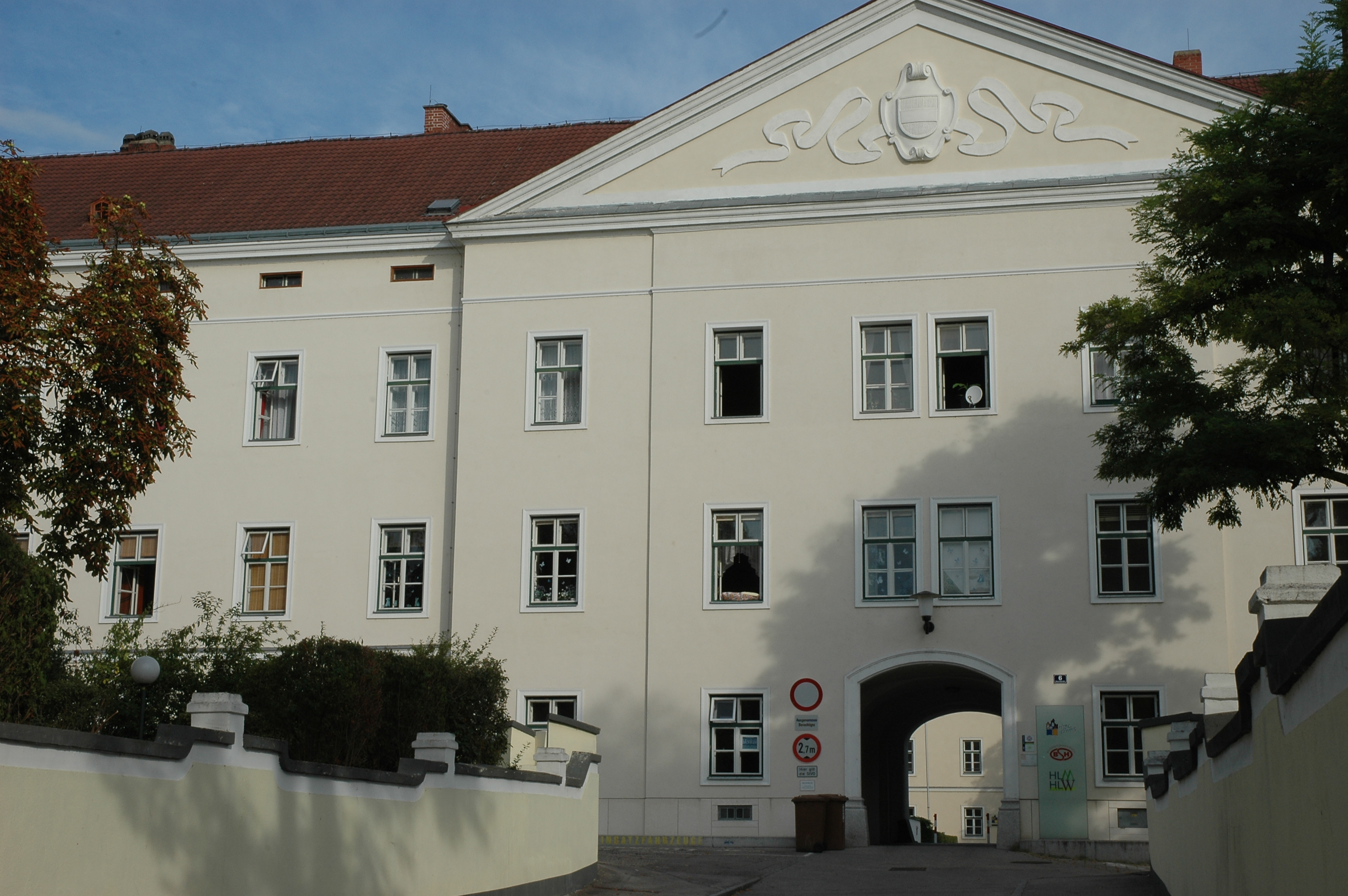 ehem. Pionier- und Infanteriekaserne, Hauptgeb., Objekt 1/HTBLA f.Mode, Kasernstraße 6, Krems an der Donau